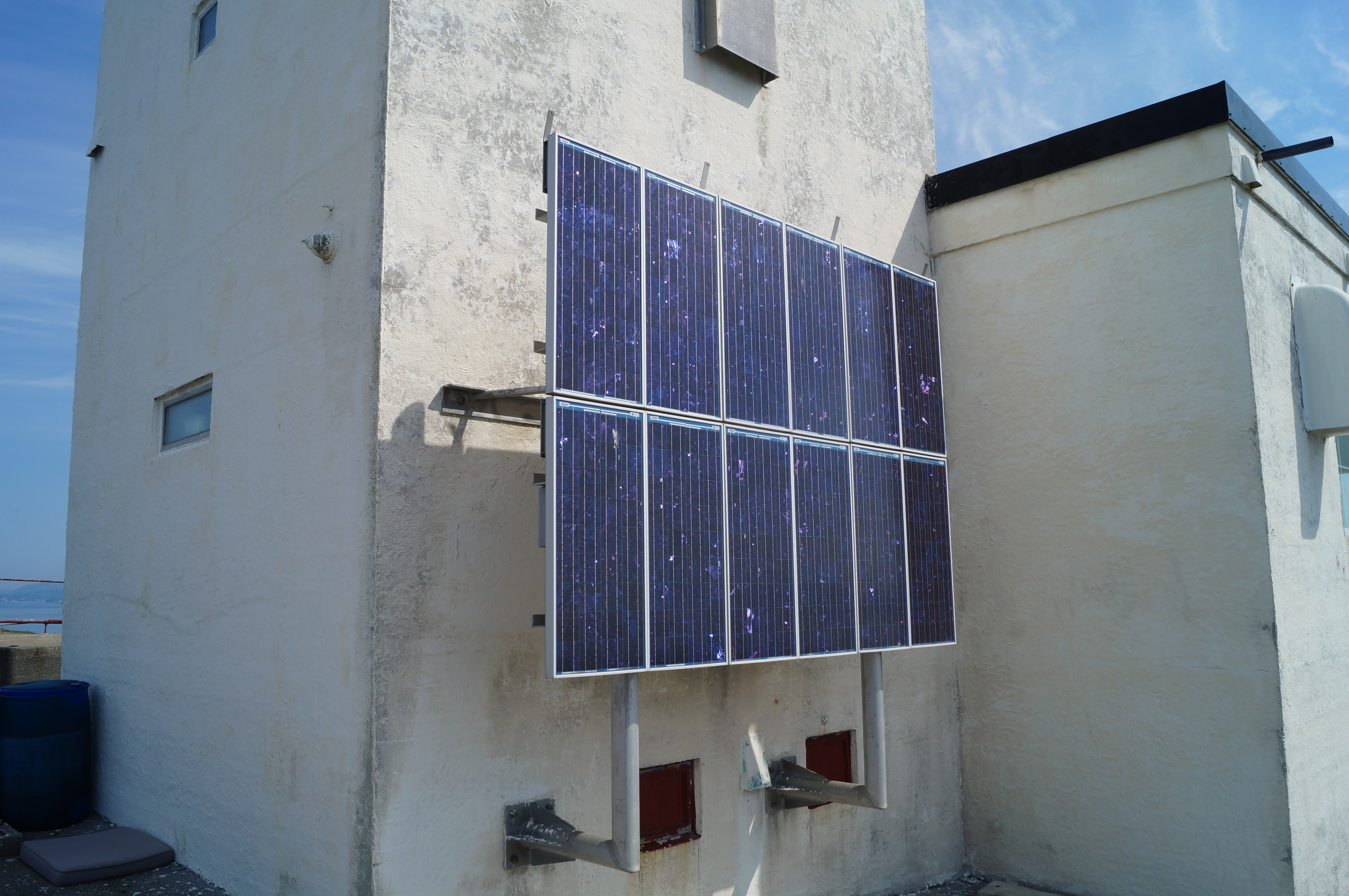 Solcellepanel som genererer elektrisk strøm til Marstein fyr